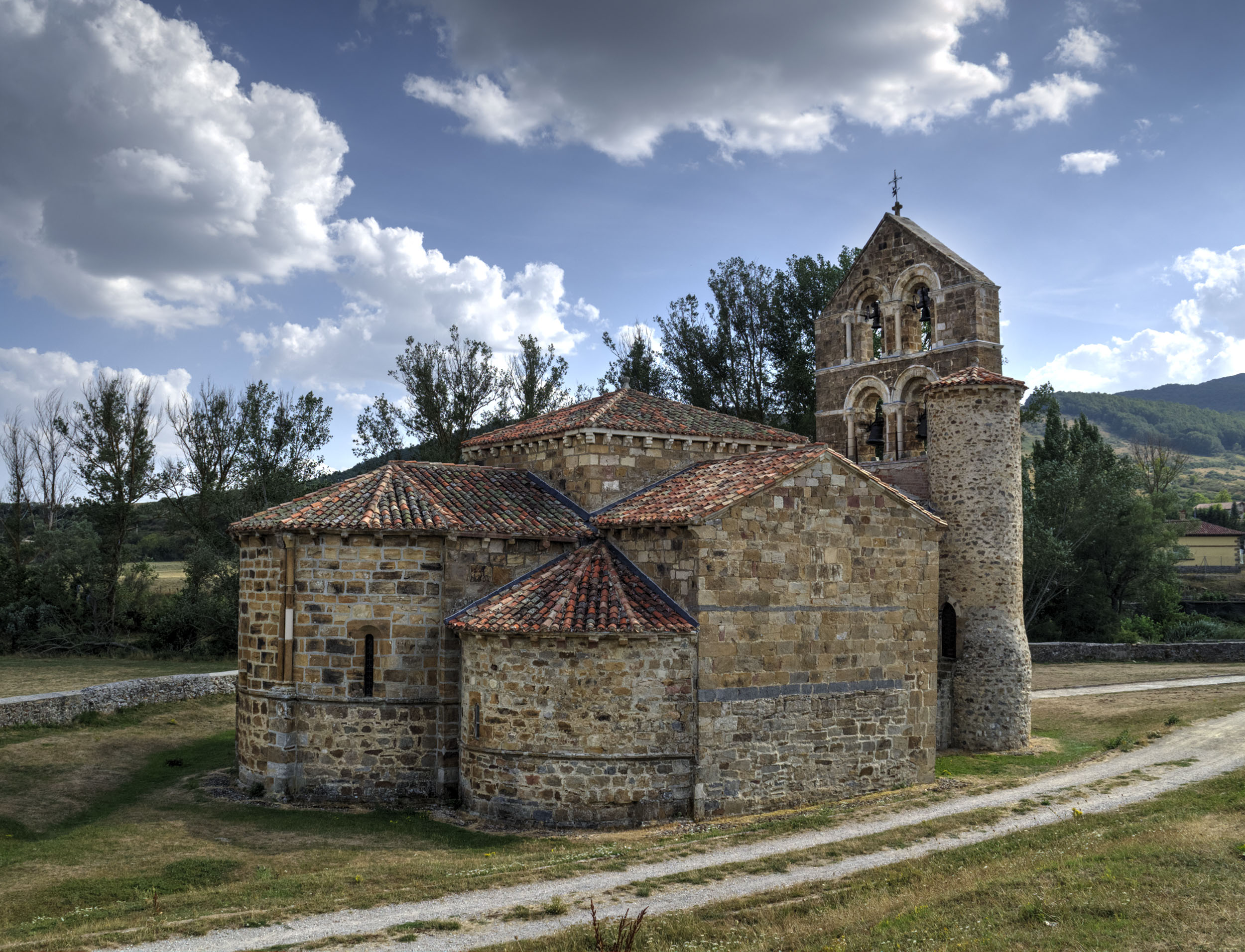 Esta iglesia, antes colegiata, está el municipio de La Pernía, Palencia. Destaca su espadaña que, al contrario que muchas otras, añadidas posteriormente, es original.